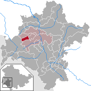 Friedelshausen in Thuringia - District Schmalkalden-Meiningen